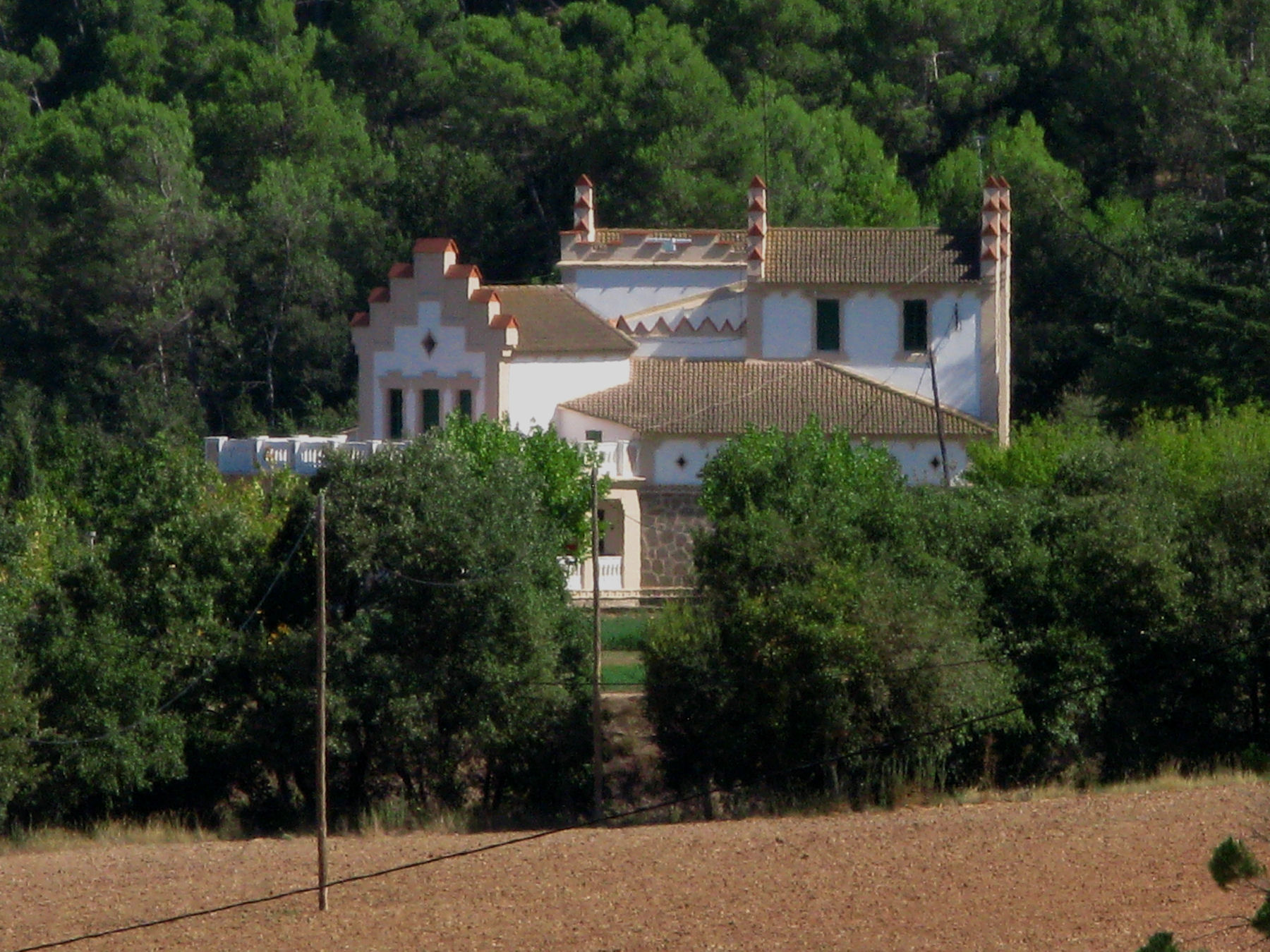 Vilaseca - Horta de Avinyó - Avinyó